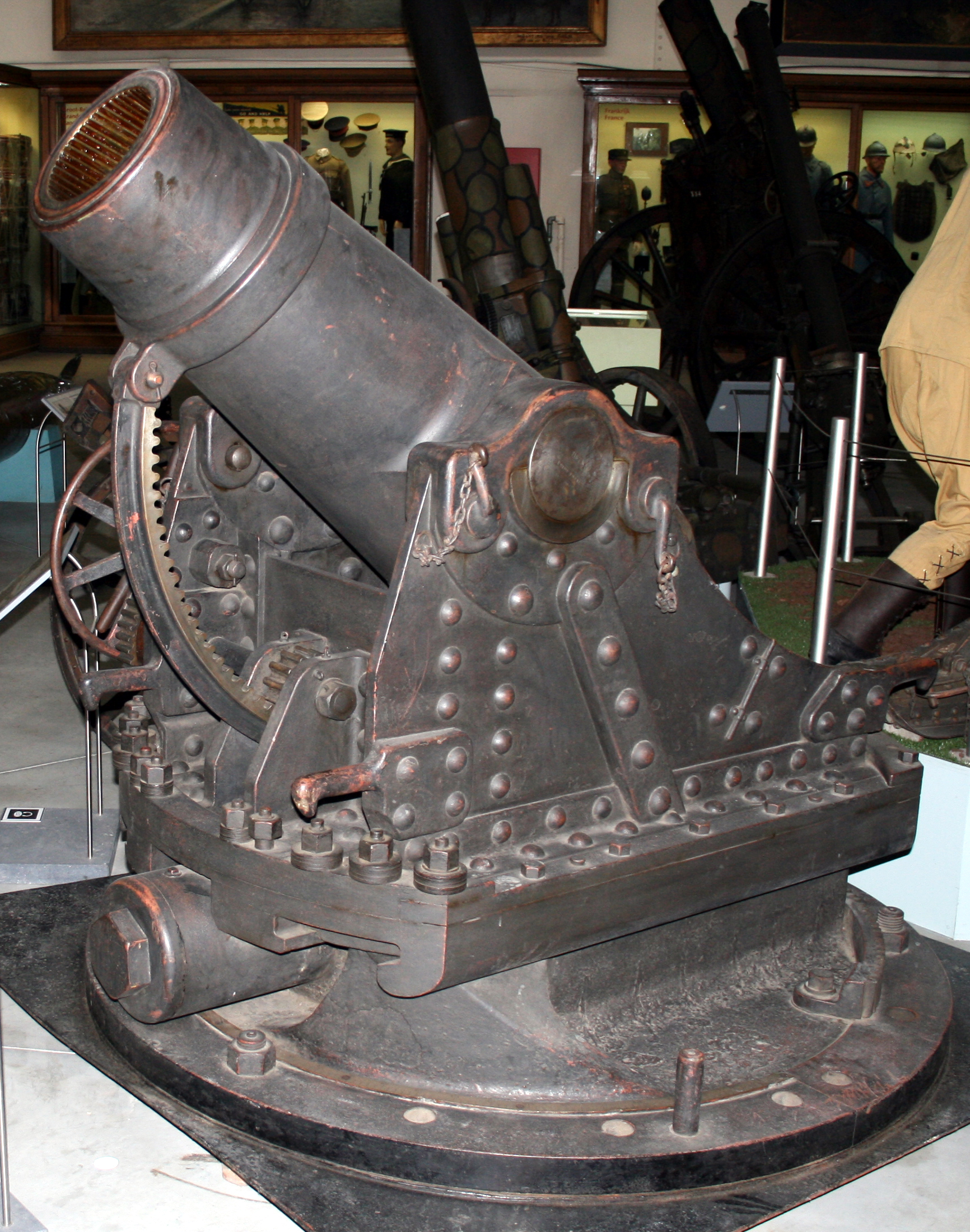 Belgian mortar 21 cm M 1894